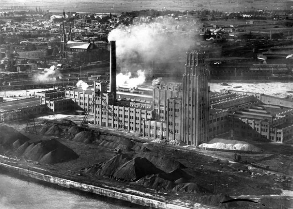 L'Anglo Canadian Pulp and Paper Mills de Limoilou vers 1927 « En 1927, le «Daily Mirror Newspaper» de Londres fonde à Québec l'«Anglo Canadian Pulp and Paper Company». En 1927-1928, on construit un moulin à papier au confluent de la rivière Saint-Charles et du fleuve Saint-Laurent. L’Anglo achète des concessions forestières dans la région de Forestville et les billots de sapin et d’épinette qui seront transformés en papier journal arrivent par barge jusqu’au quai de l’usine. En 1945, la papetière emploie 1000 travailleurs. L’activité y sera intense jusque dans les années 1970. » – Société historique de Québec